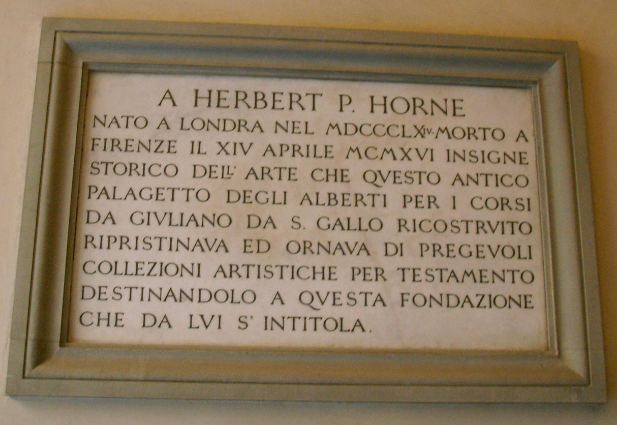 Palazzo corsi-horne, targa Herbert P. Horne